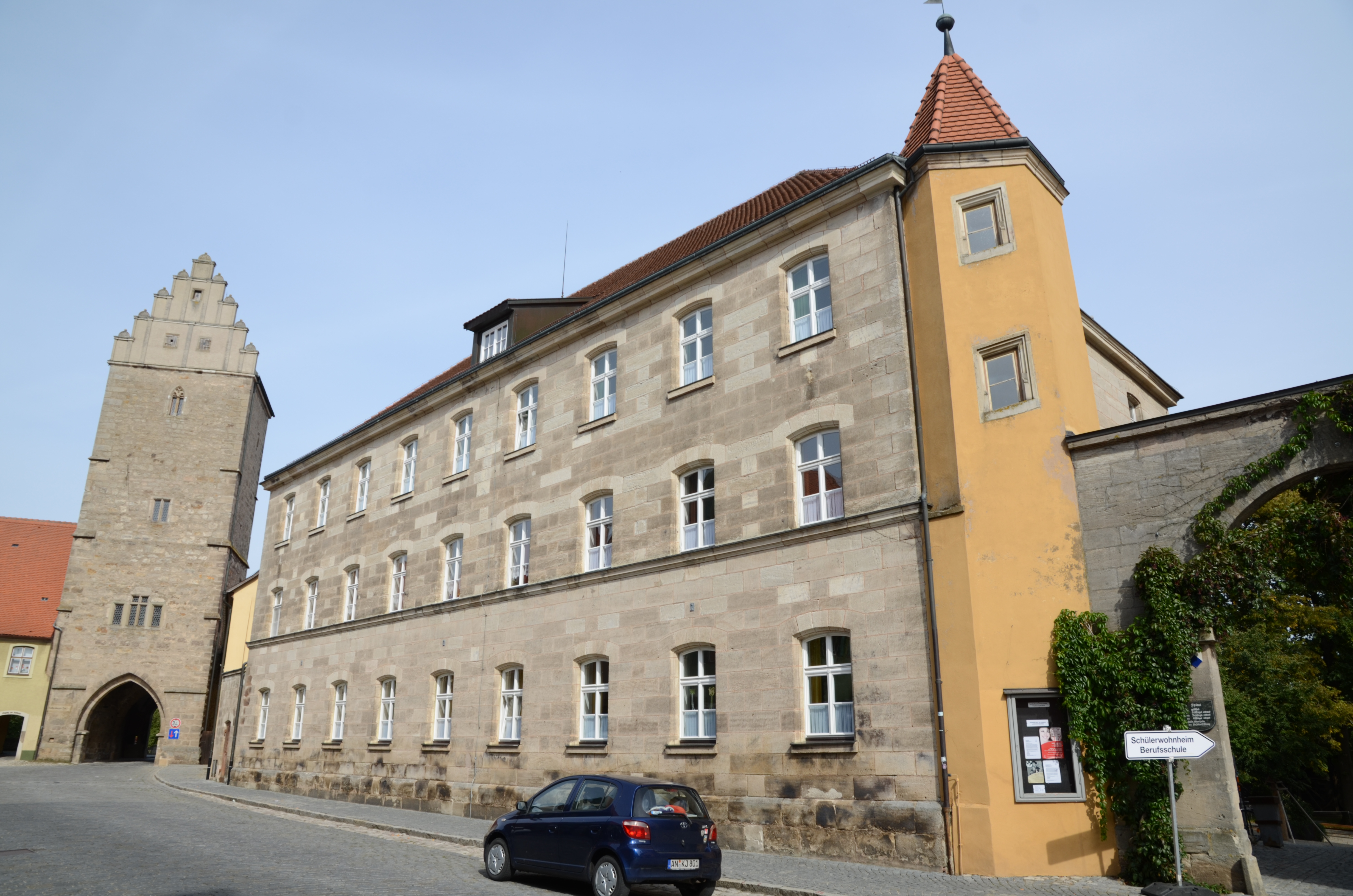 Dinkelsbühl Dr.-Martin-Luther-Straße 6 c